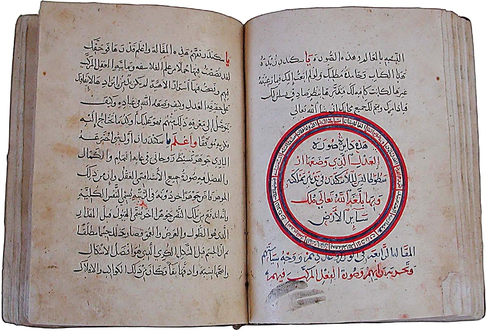 Secreta secretorrum sirio (ca. 1250-1275)